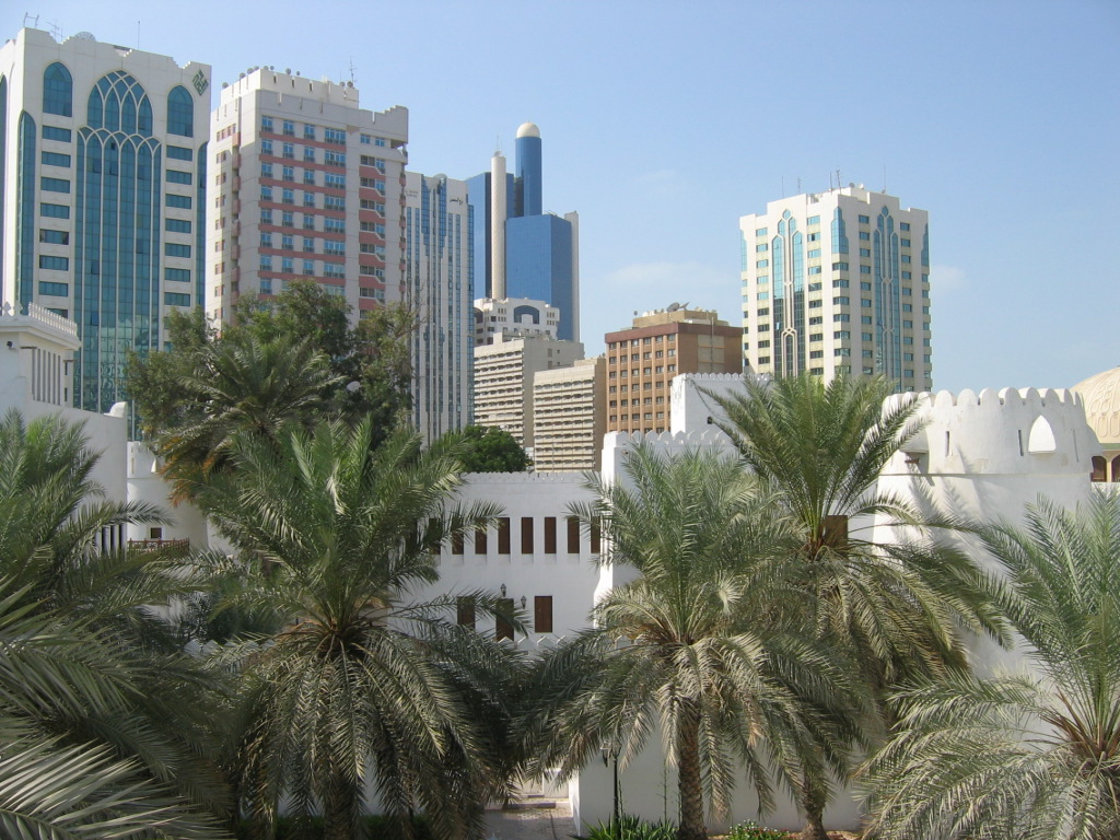 Abu Dhabi City vom Fort Qasr Al Hosn aus gesehen